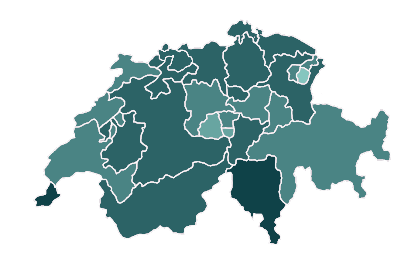 Resultate zur 1. August-Initiative